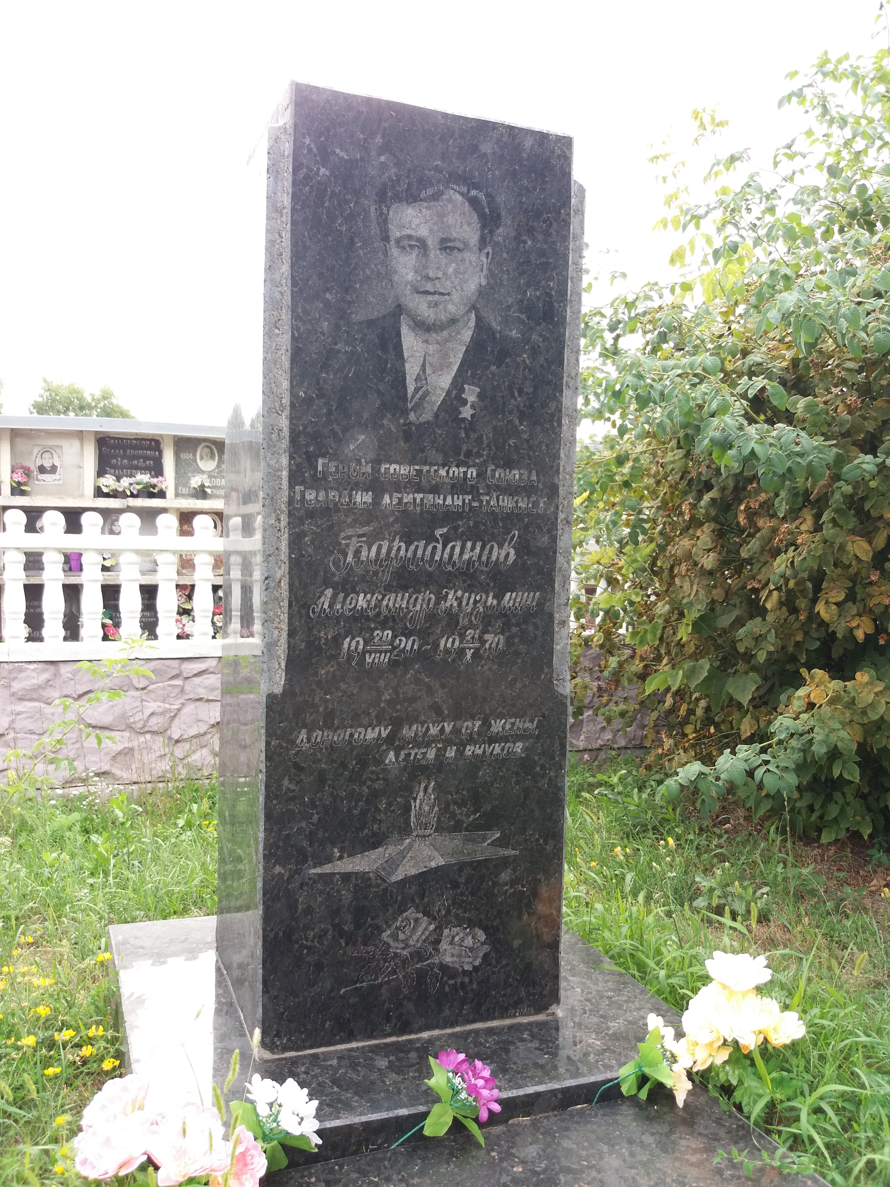 Могила Барабанова О. К., Героя Радянського Союзу, Харків, вул. Пушкінська, 102, 2-е міське кладовище